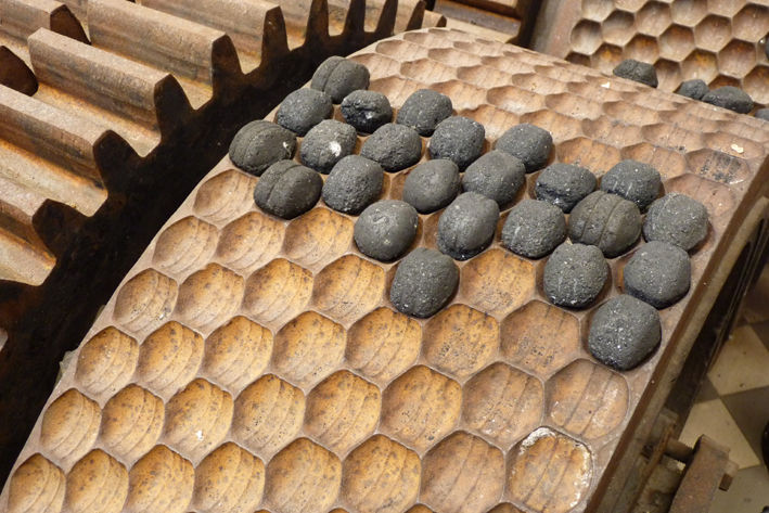 Presse à Boulets de la Grand Combe